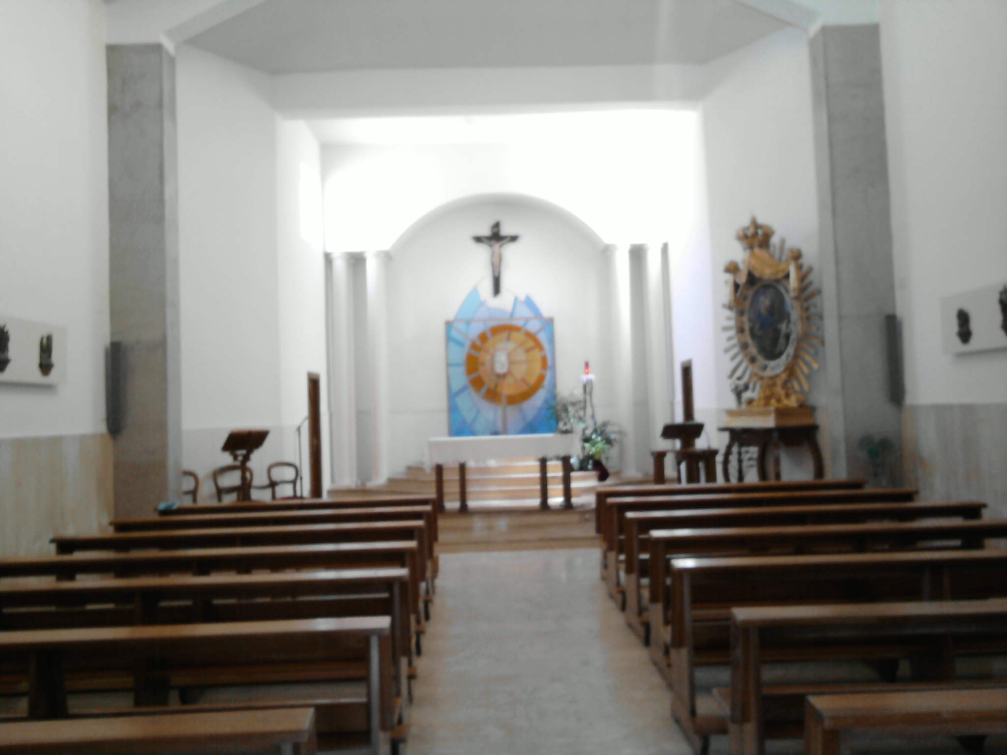 Interno della Chiesa dell'Adorazione di Palmi